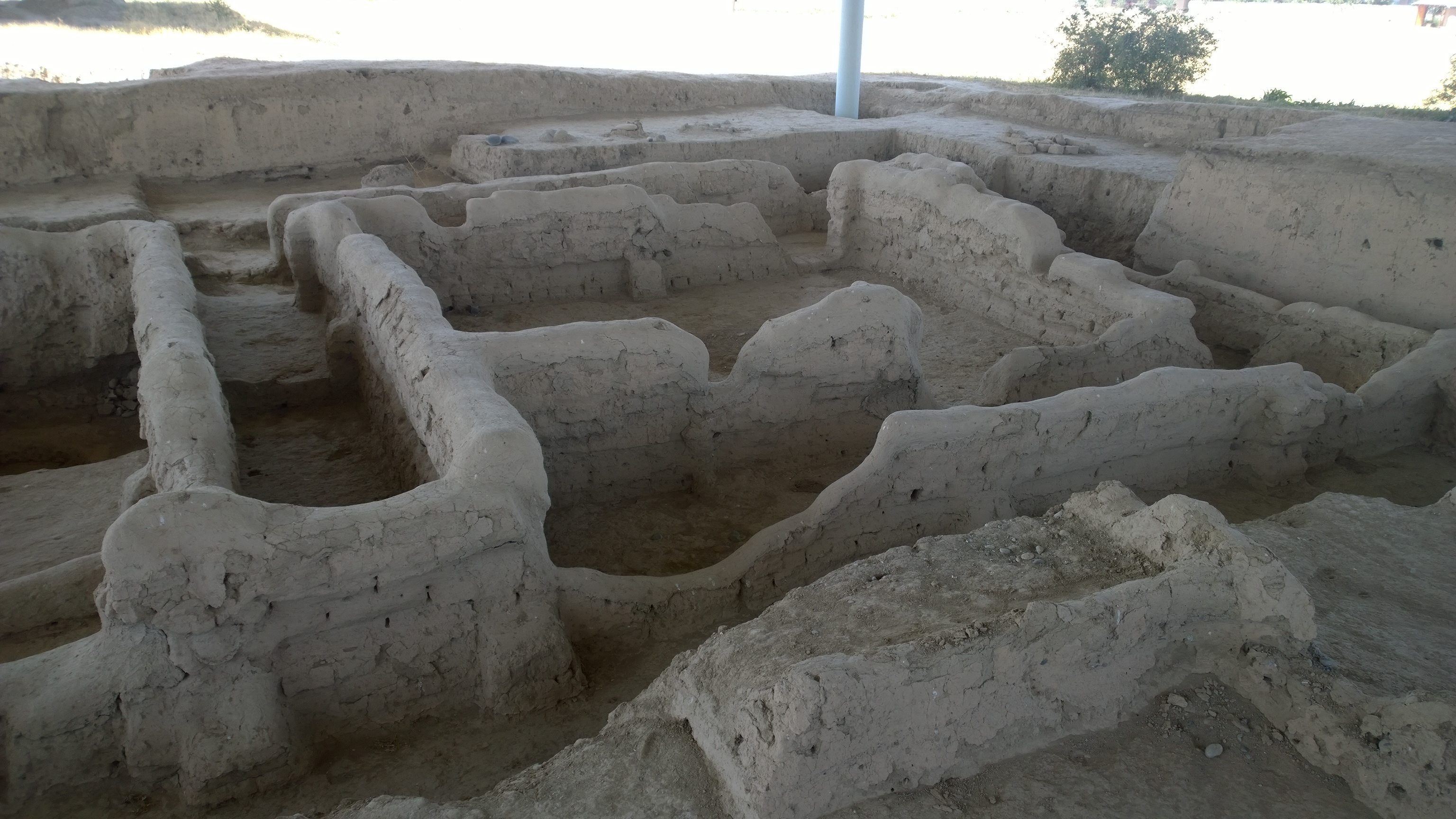 Тоҷикӣ: Саразм